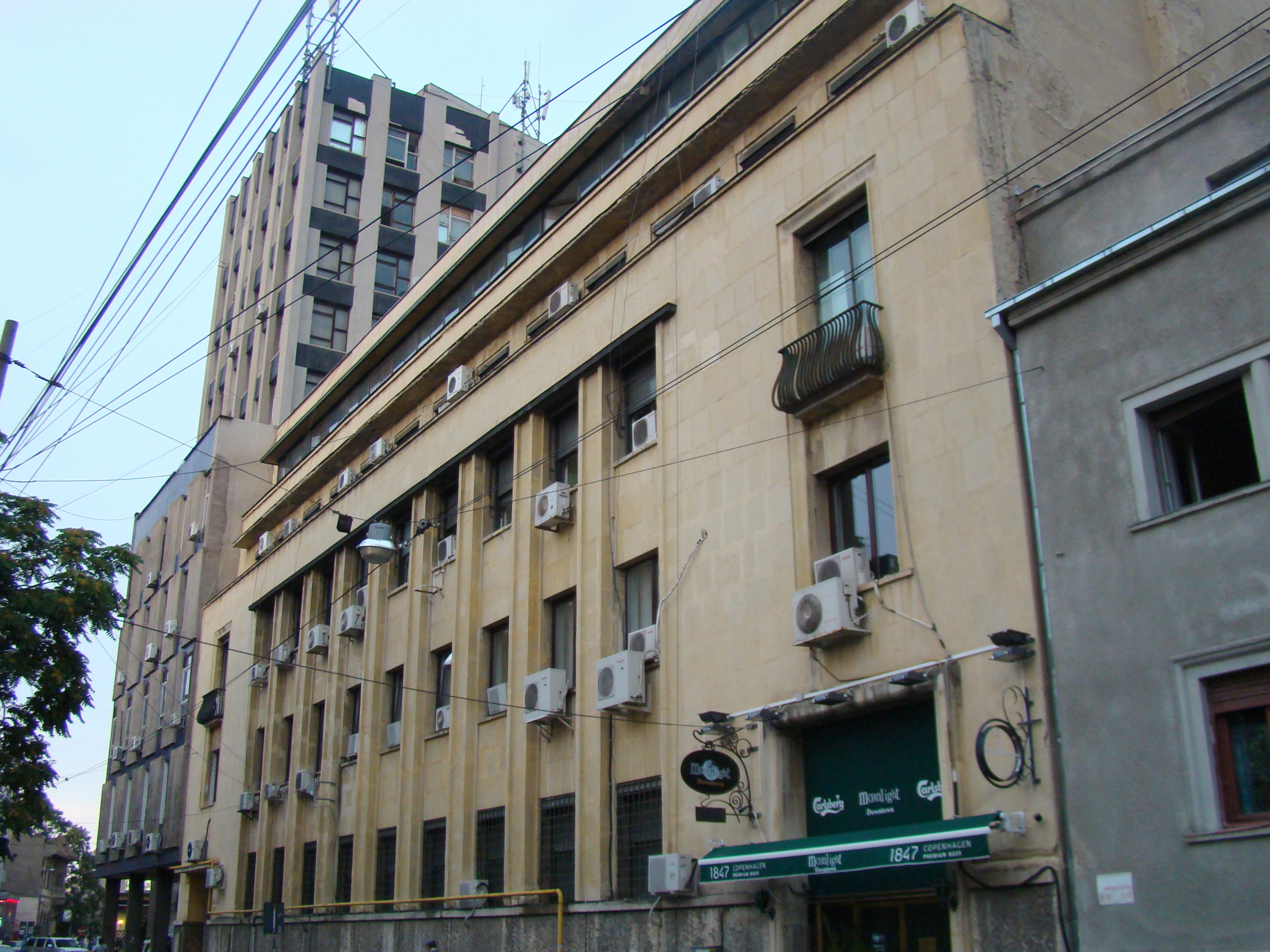 Casă monument istoric, str. Mendeleev, nr.34